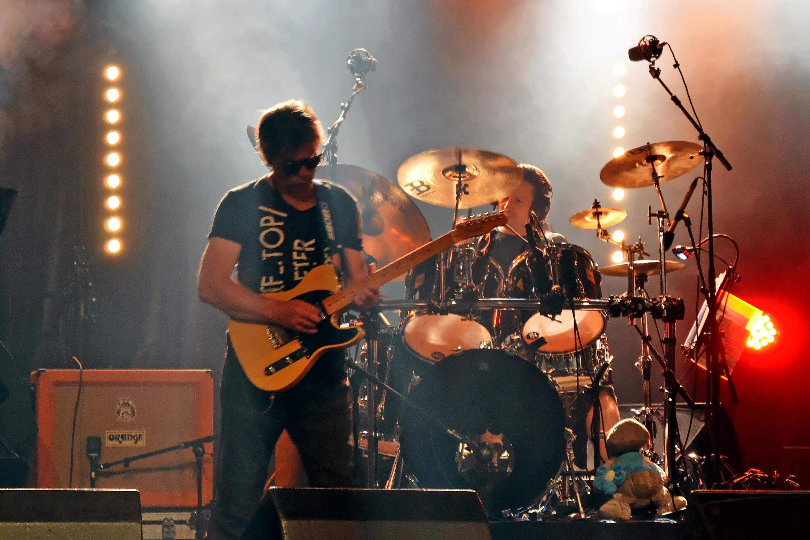 Xavier Géronimi, dit Tox, en concert avec Breizharock lors de l'Eté en Fête à Bénodet, le 14 juillet 2014.